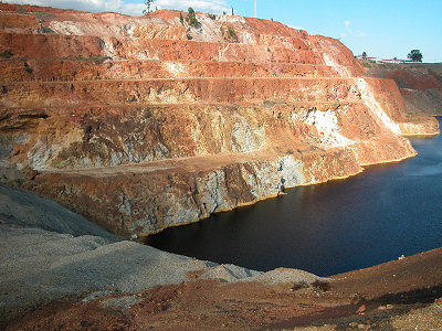 Mine de cuivre de São Domingos